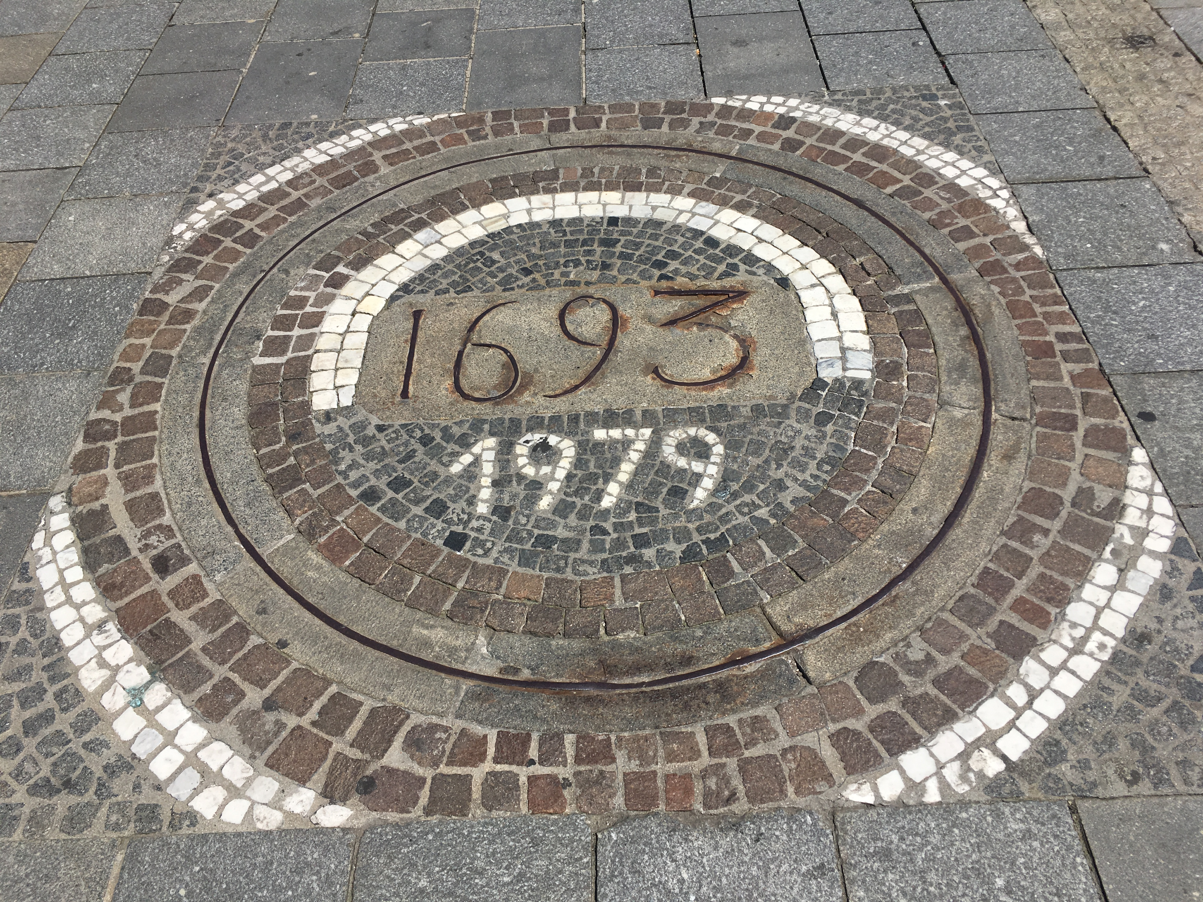 Linz Glockenring 1693 1979